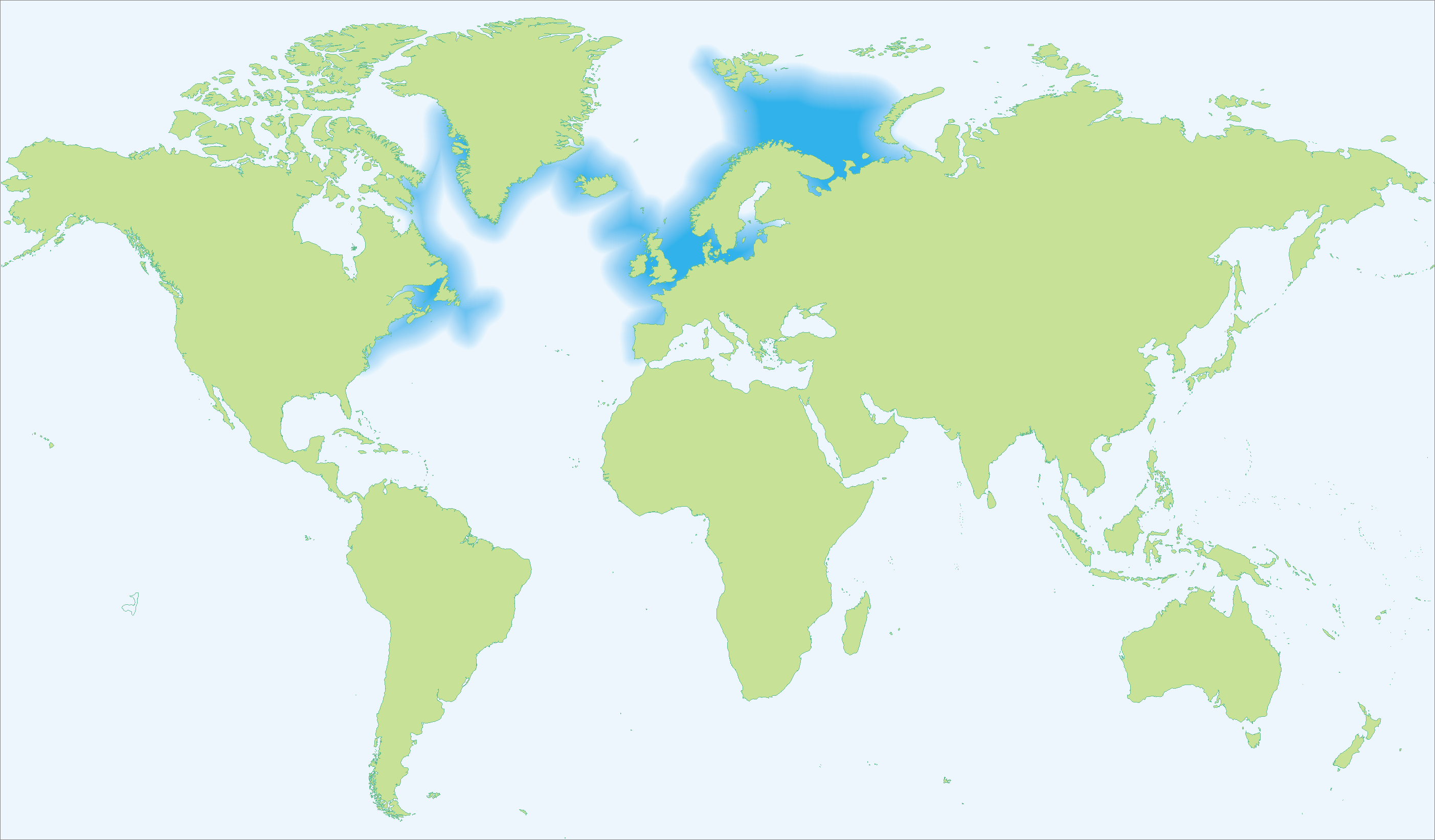 Gadus morhua (Atlantic cod) range map